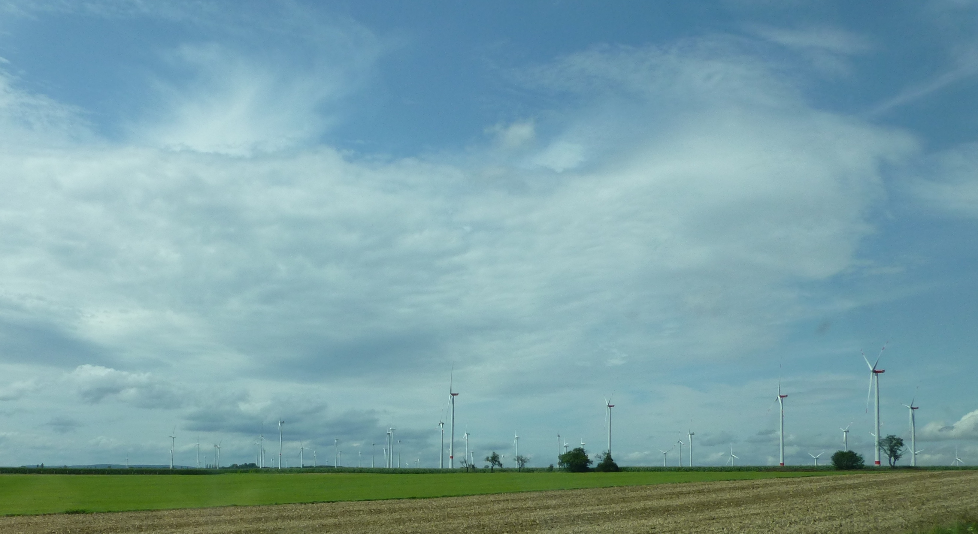 Der Windpark bei Hochheim-Wangenheim